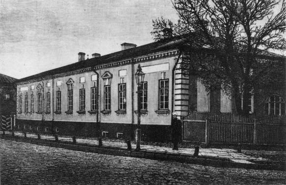 Фото дома